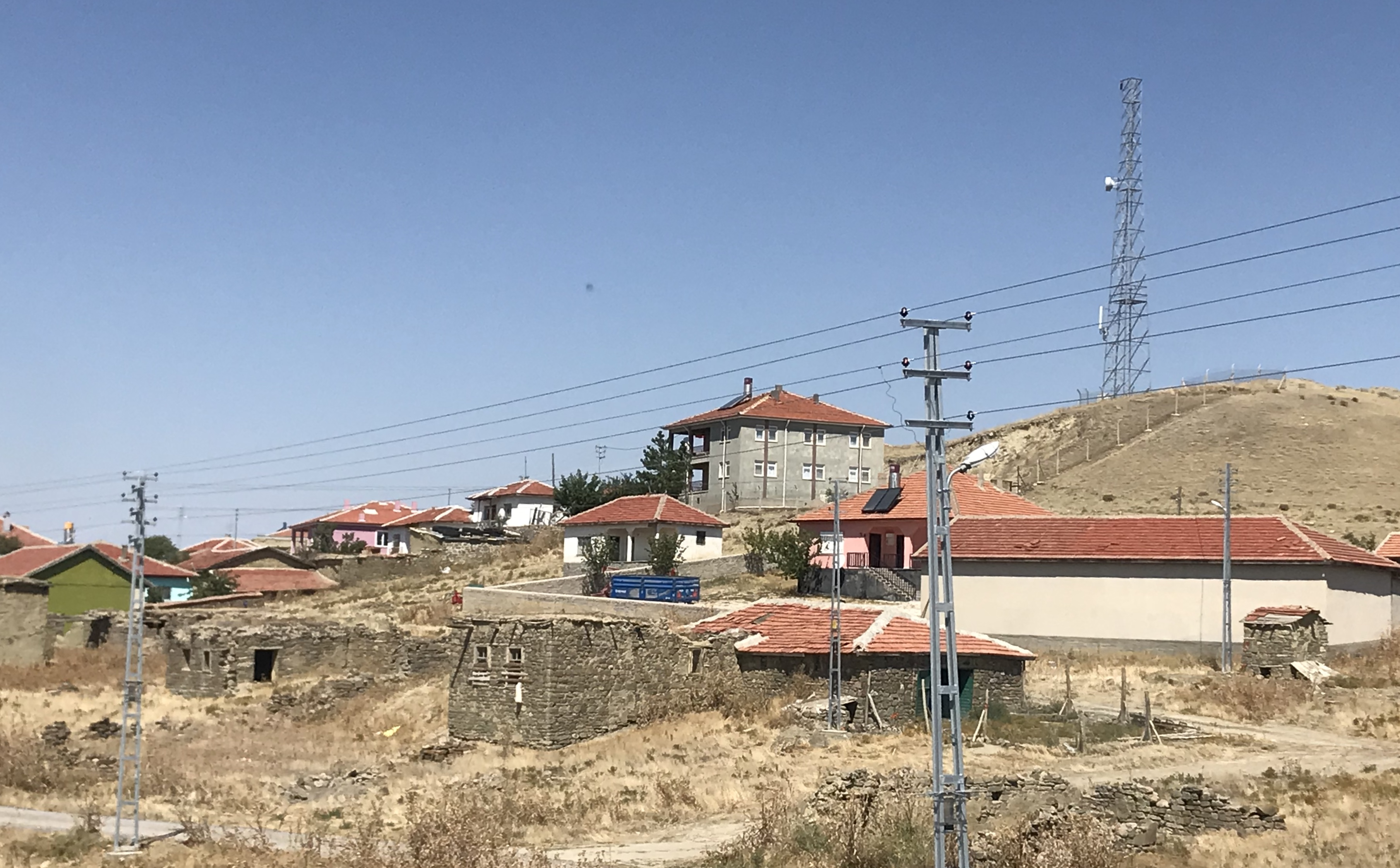 Uitzicht op het dorp Şerefligökgöz in Haymana in de zomerperiode